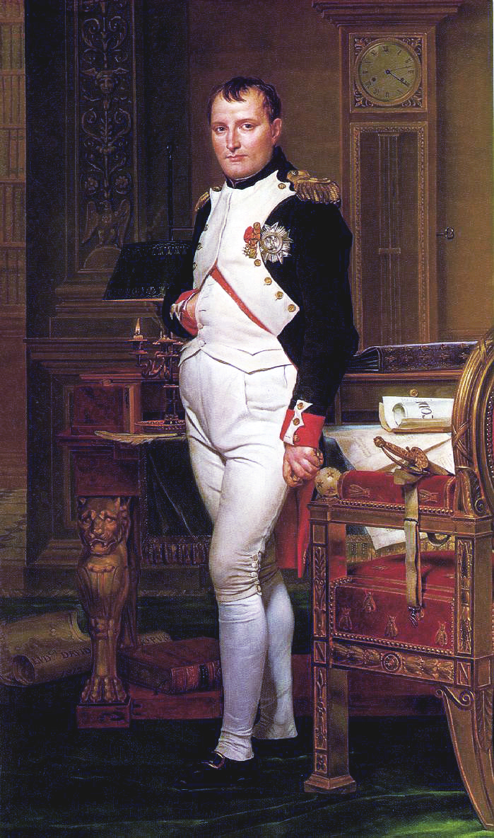 Napoléon dans l'uniforme de Colonel des chasseurs à cheval de la Garde impériale : uniforme avec collet et parements écarlates, revers de couleur verte à passepoil écarlate, boutons unis en pain de sucre, basques à retroussis brodés de cors de chasse en or, épaulettes d'or, bottes d'uniforme, gilet blanc et culottes, souliers à boucles d'or, des bas de soie.